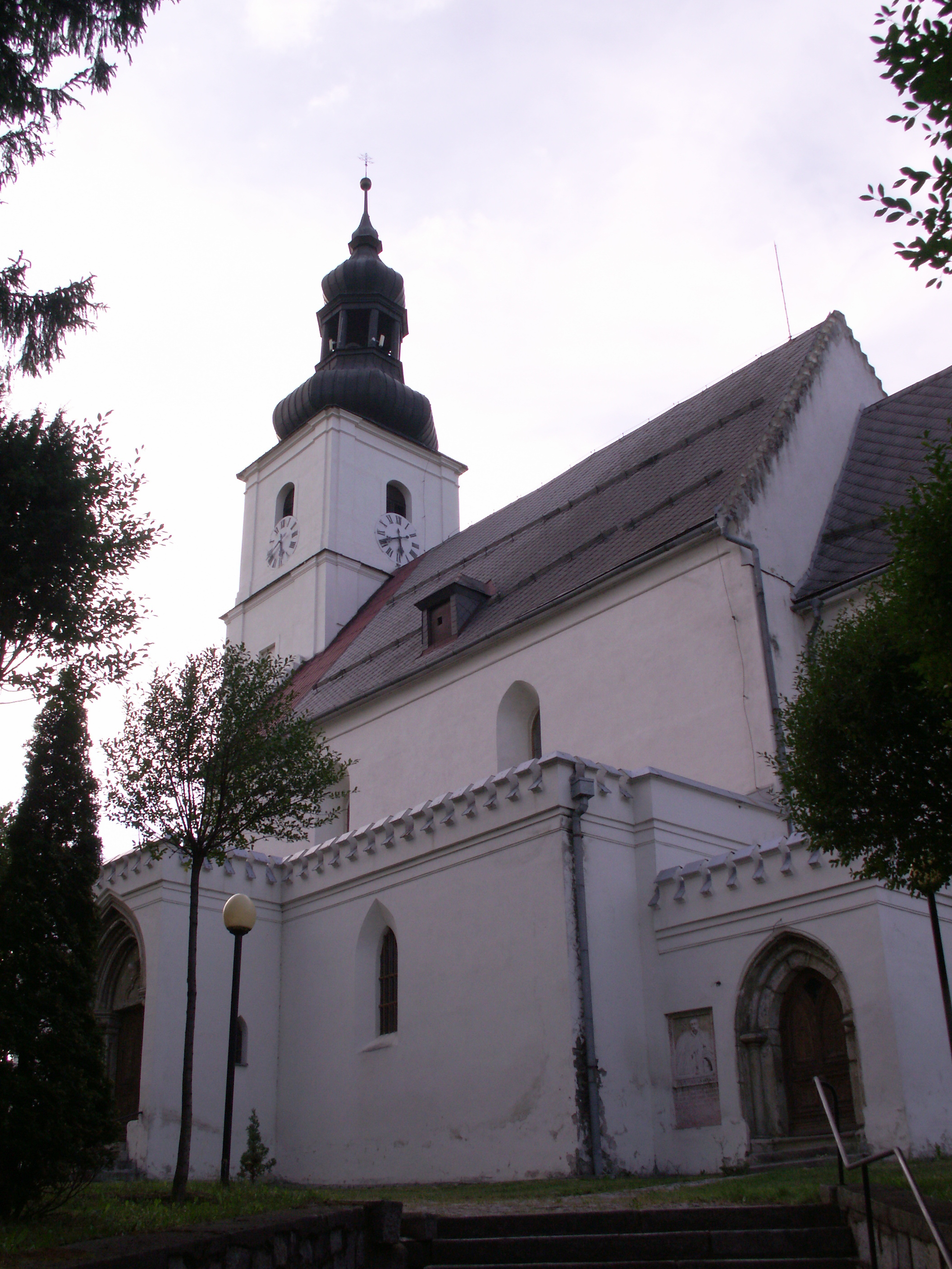 Bernartice, okres Jeseník, kostel sv. Petra a Pavla